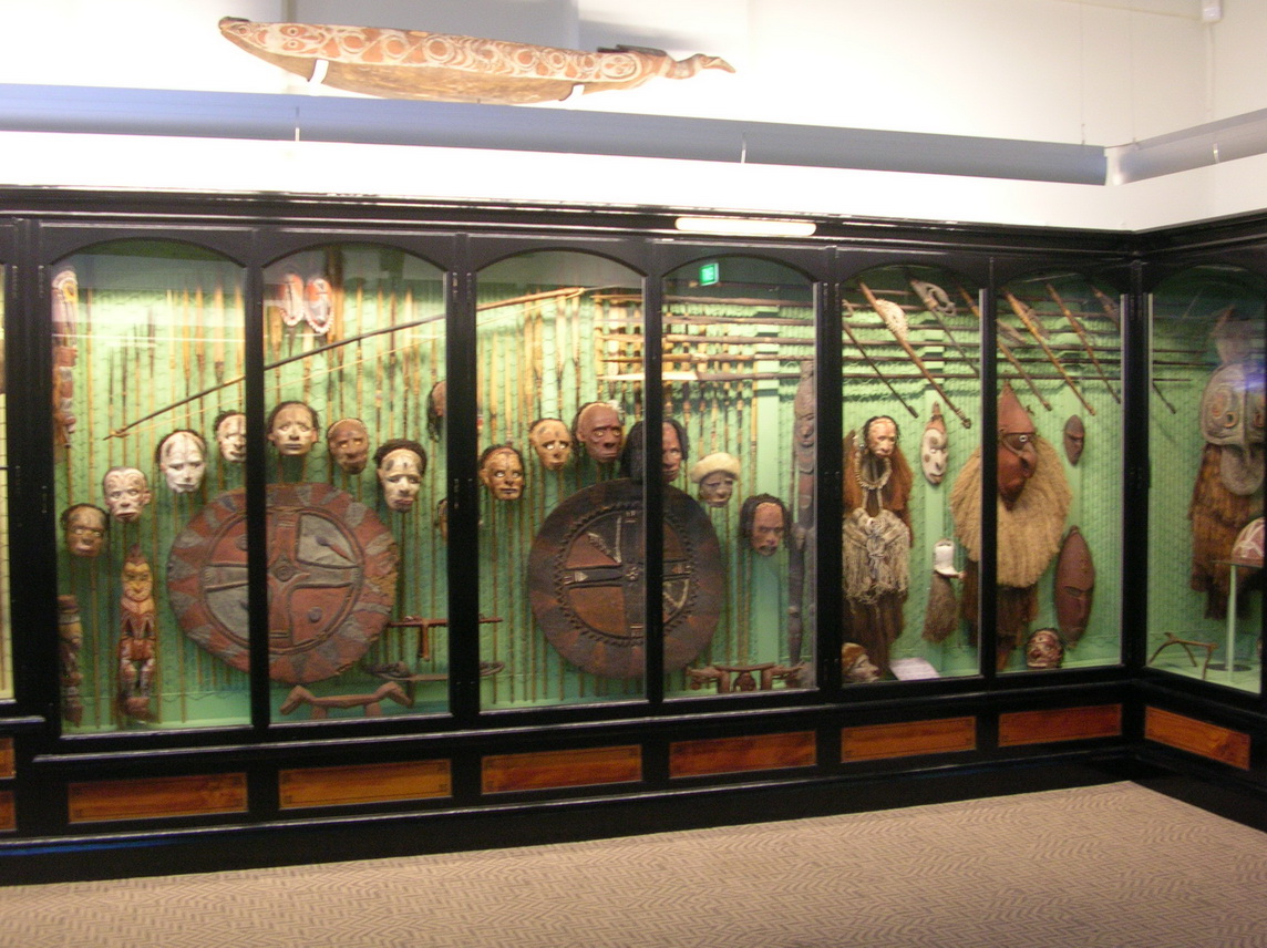 南澳洲博物館 South Australian Museum